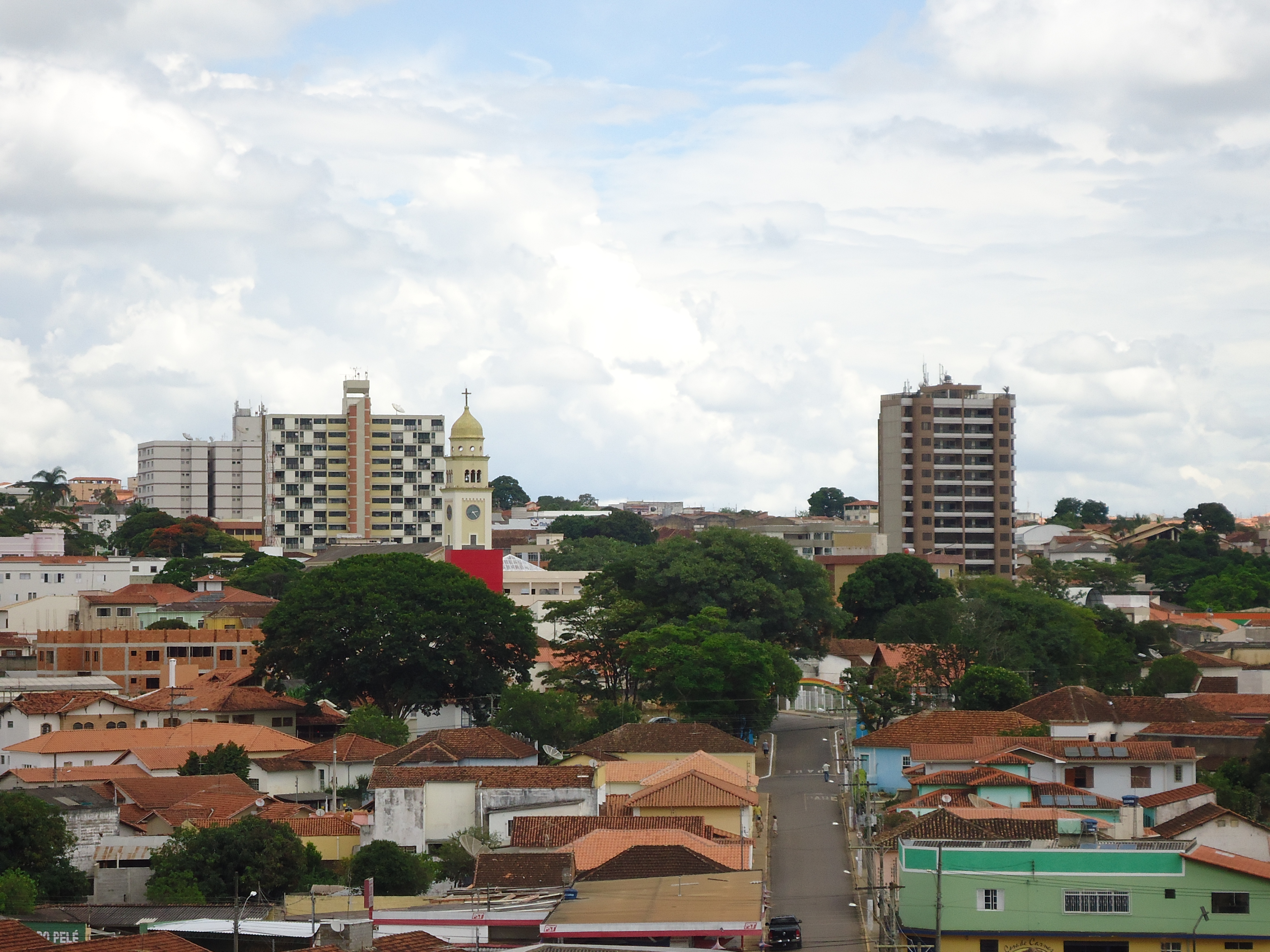 Foto do centro da cidade.